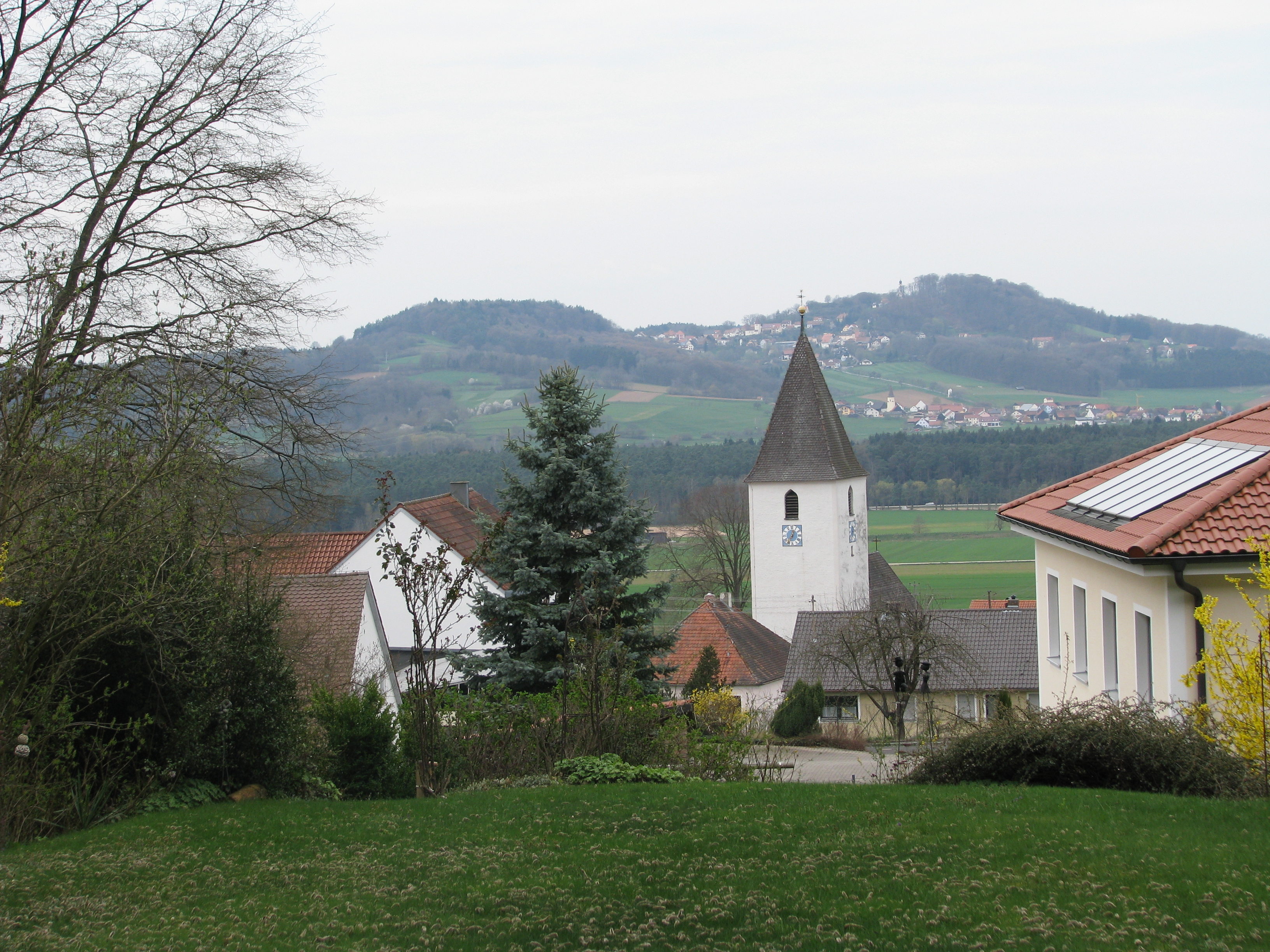 Wappersdorf, Ortsteil von Mühlhausen im Landkreis Neumarkt in der Oberpfalz